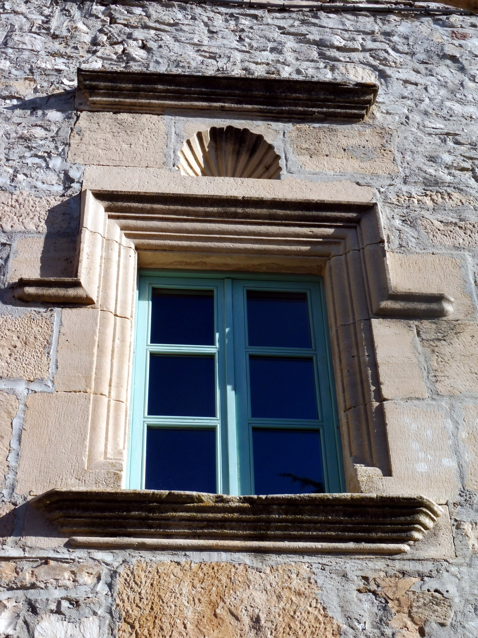 Cal Perelló (Montoliu de Segarra): detall d'una finestra